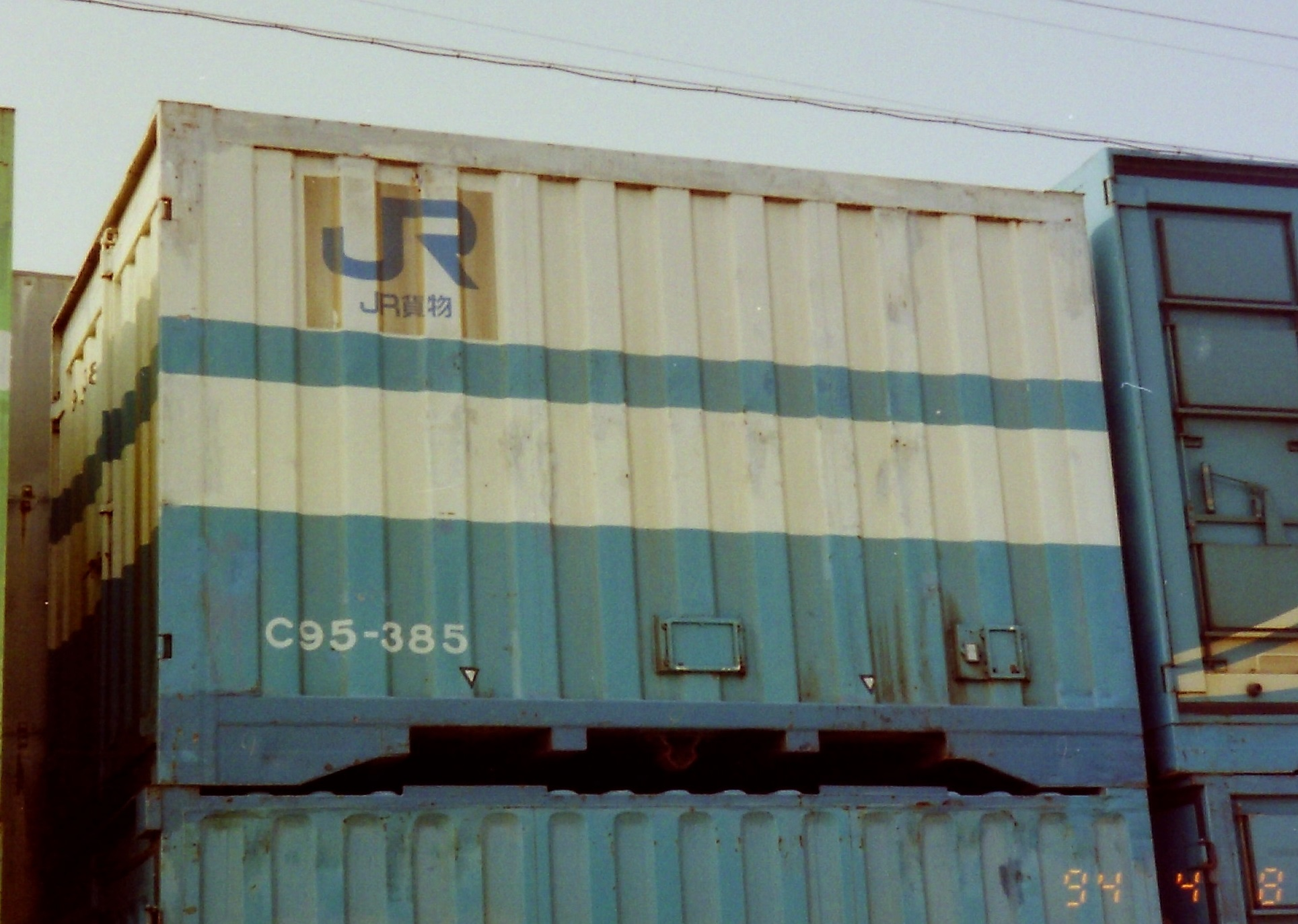 撮影地＝【香川／旧、高松(タ)】